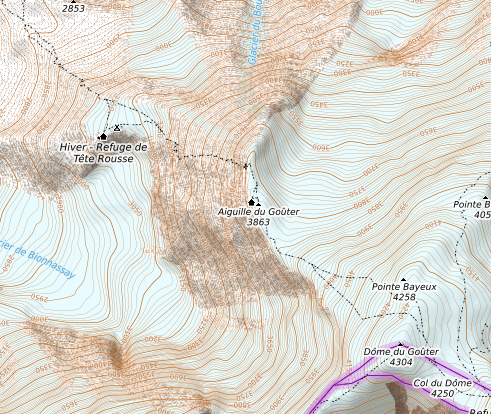 carte réalisée sur umap This map may be incomplete, and may contain errors. Don't rely solely on it for navigation.